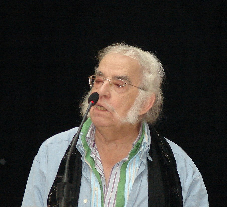 Agustín García Calvo durante la charla-coloquio ofrecida en el Antiguo Teatro Cómico Principal de Córdoba el día 19 de mayo de 2008.